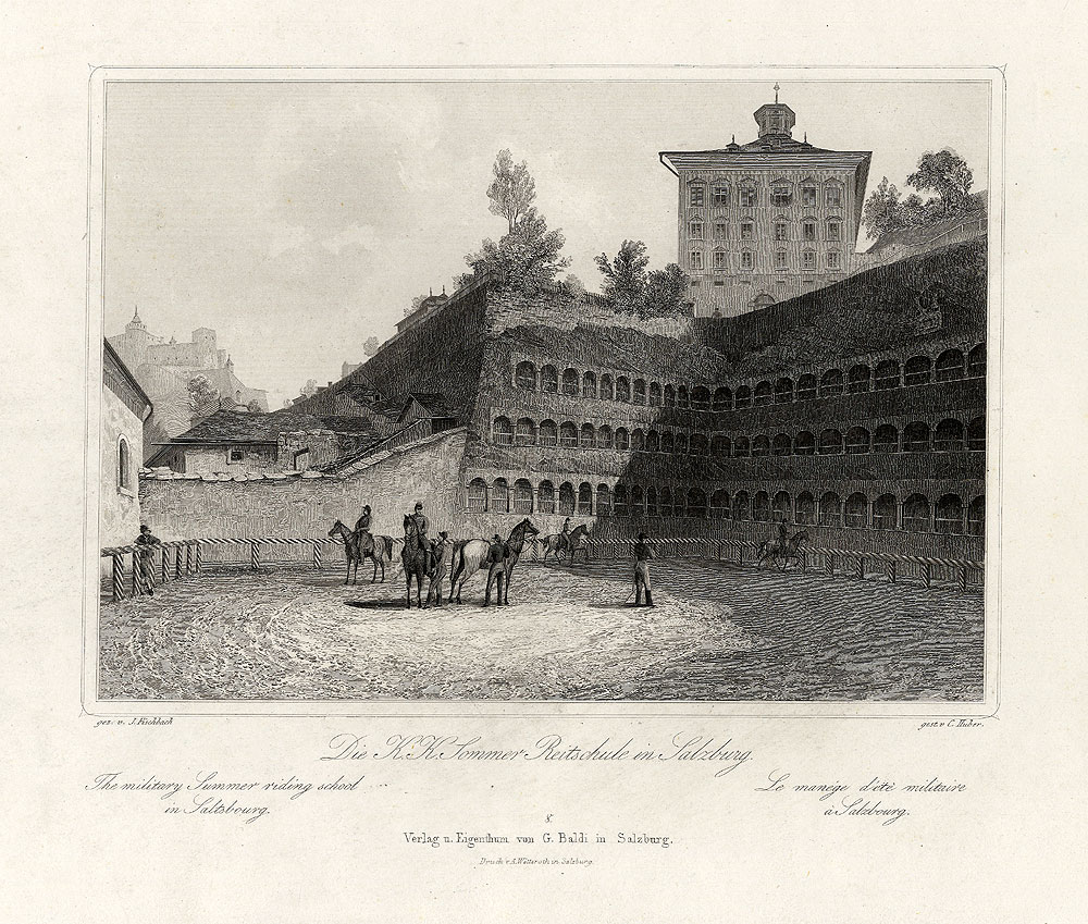 Stahlstich aus: Malerische Ansichten von Salzburg und Oberösterreich, 1852